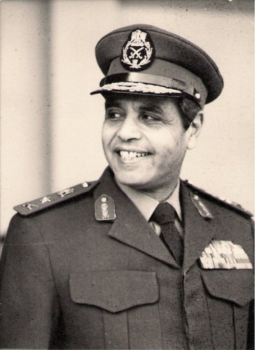 no original description